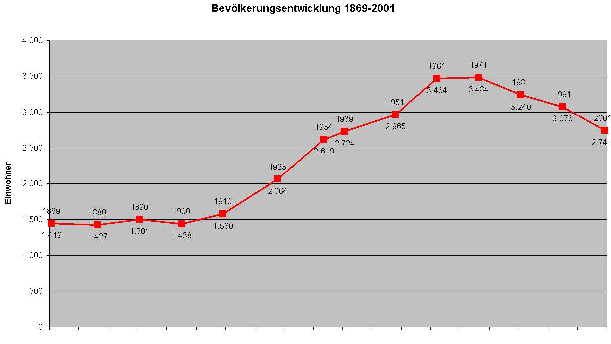 Selbst erstellt 31.03.2006 mit Daten der Statistik Austria